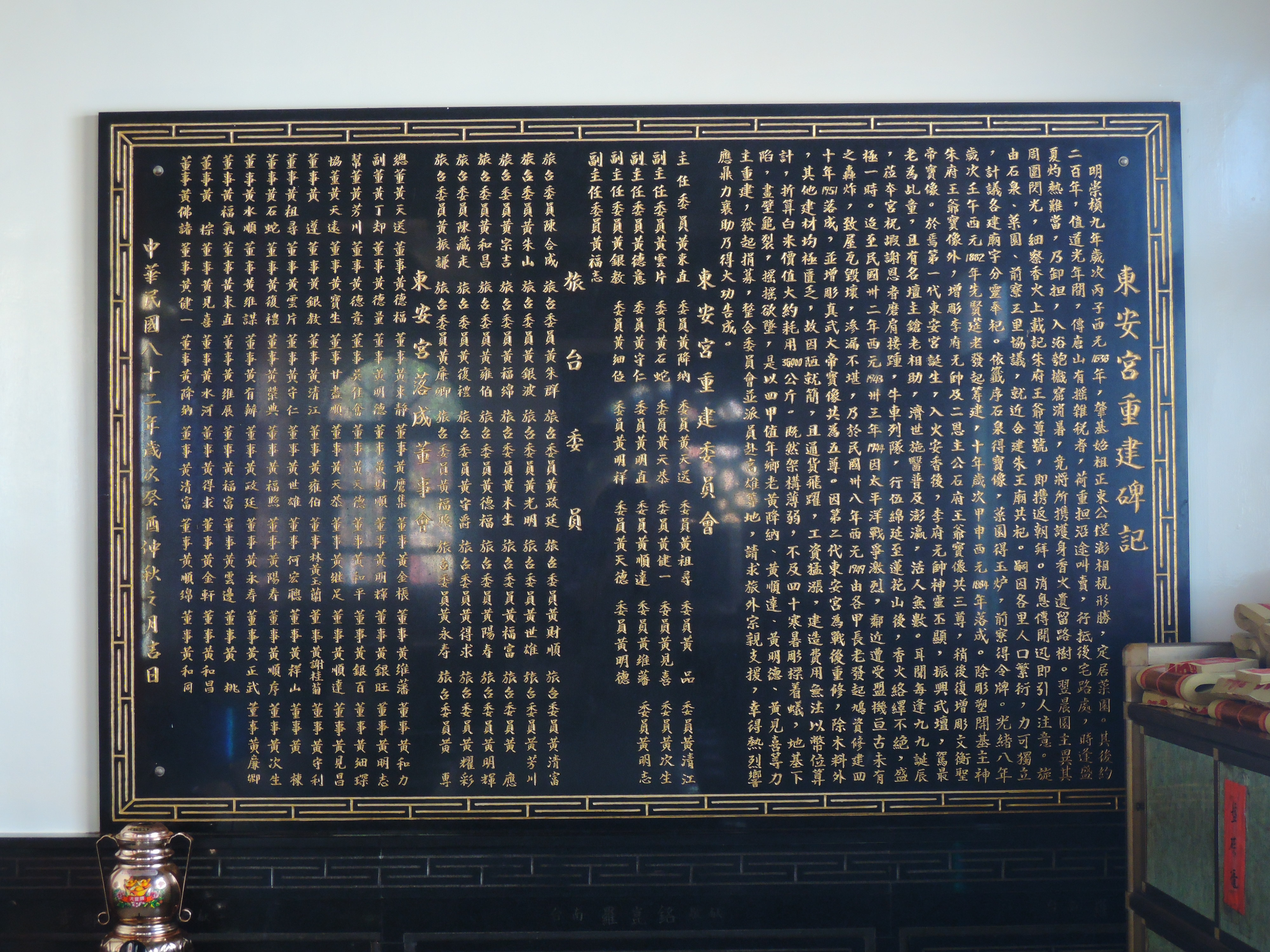 菜園東安宮，主祀朱府王爺。